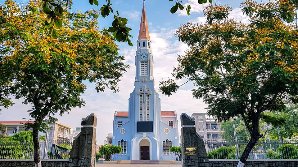 Nhà thờ chính tòa Qui Nhơn còn gọi là Nhà thờ Nhọn nằm ở thành phố Quy Nhơn, tỉnh Bình Định. Đây là nhà thờ chính tòa của Giáo phận Qui Nhơn. Nguồn ảnh : Quy Nhon Discovery